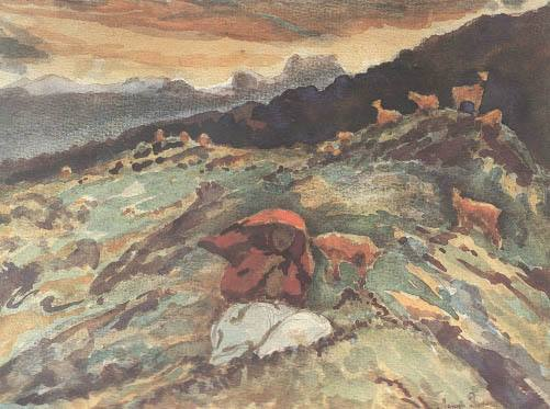 Lazar Drljaca, La bergère à Borci 1935, aquarelle, 209 x 270 mm